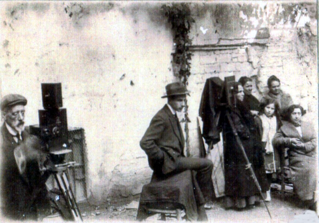 Angel Garcia Cardona filmando una pelicula en Valencia